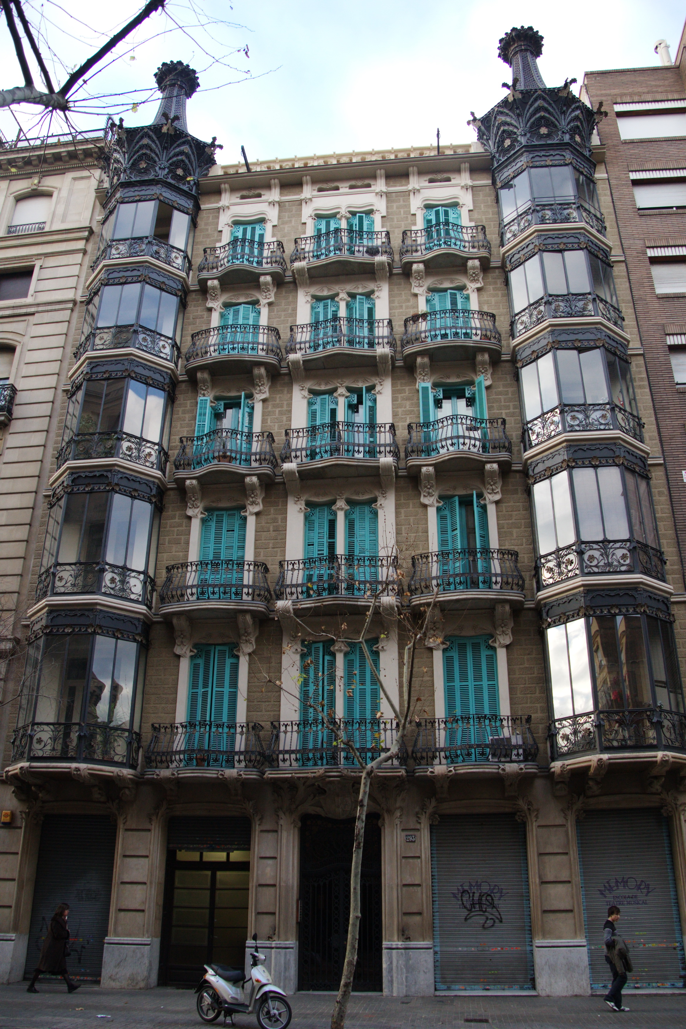 Casa Santurce (Barcelona)